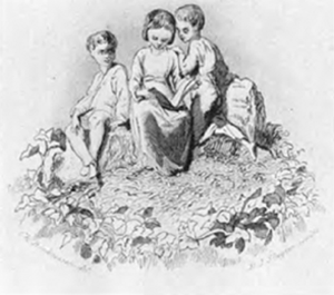 Illustratie van Charles Rochussen voor J.P. Heije's kinderboek Al de kinderliederen (1861).